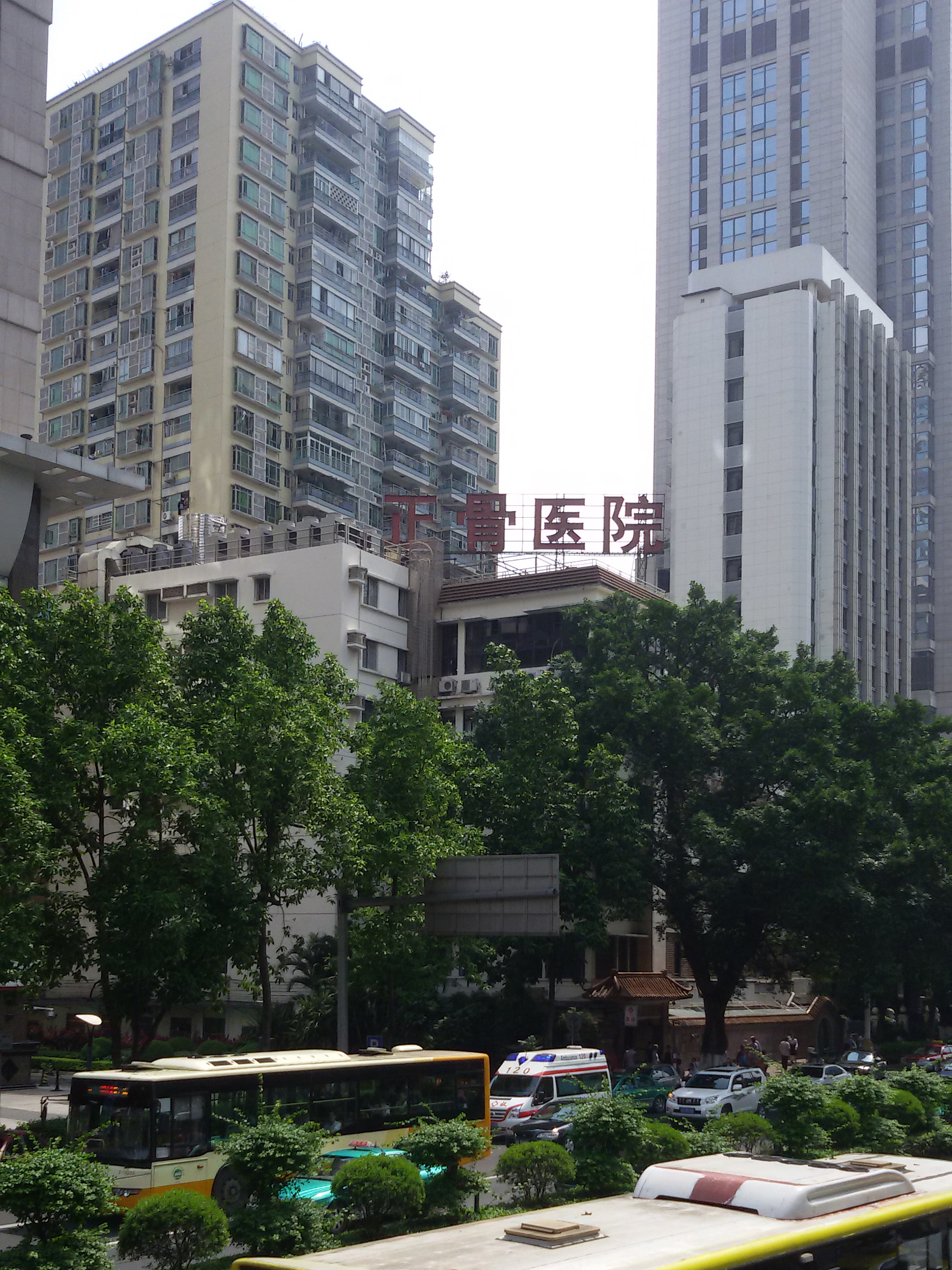 粵語: 广州市正骨医院